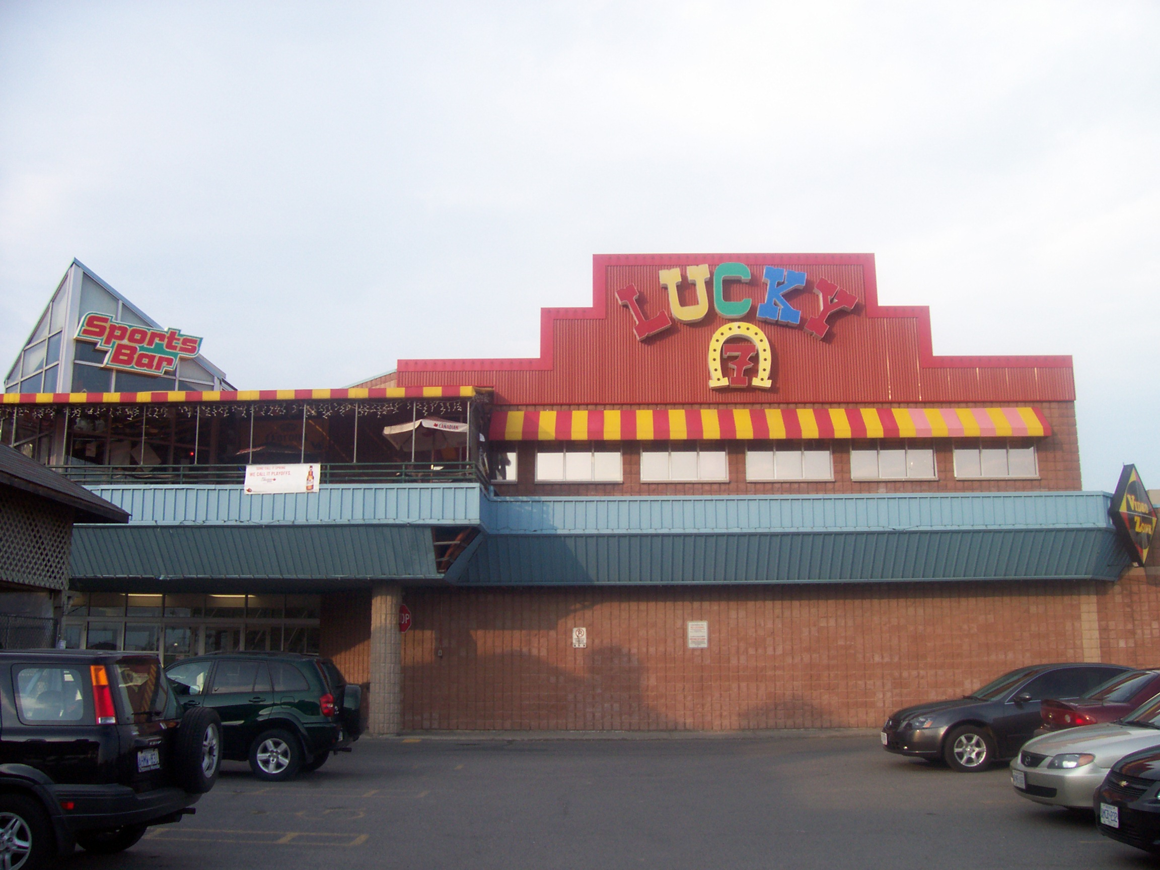 Taken in Embrun, Ontario.